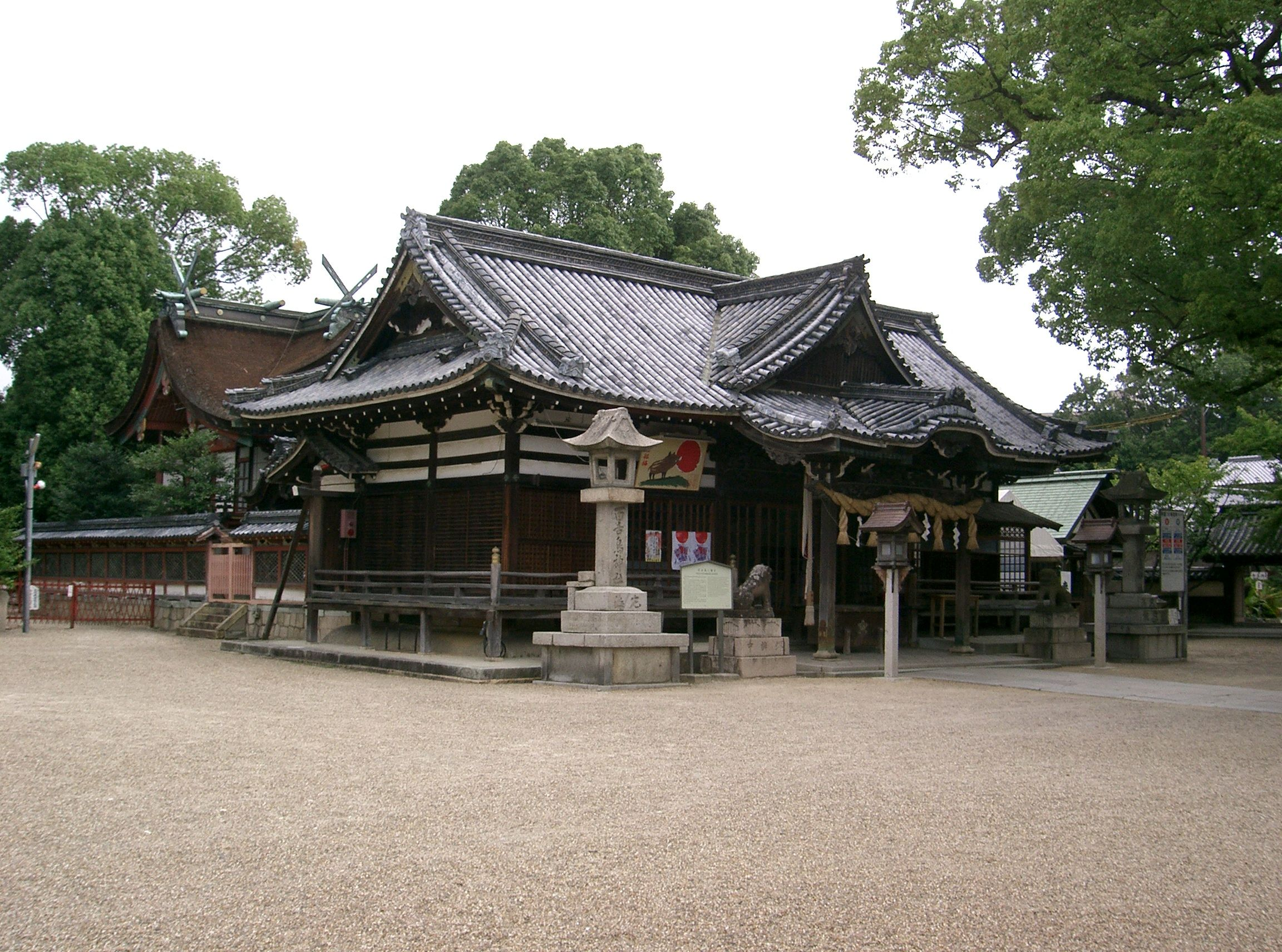 百舌鳥八幡宮 拝殿